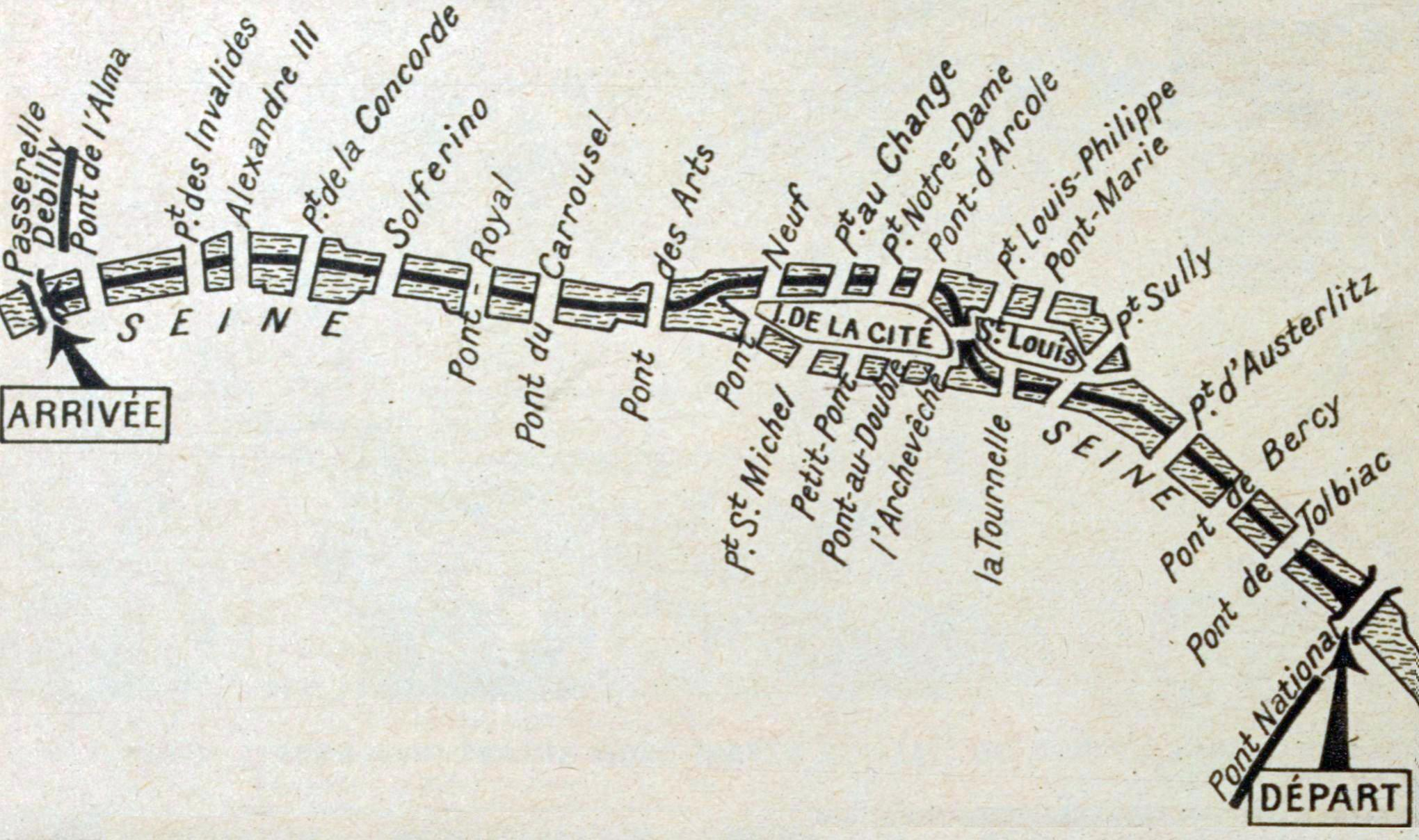 plan de la traversée de Paris à la nage (amateur, 1923)